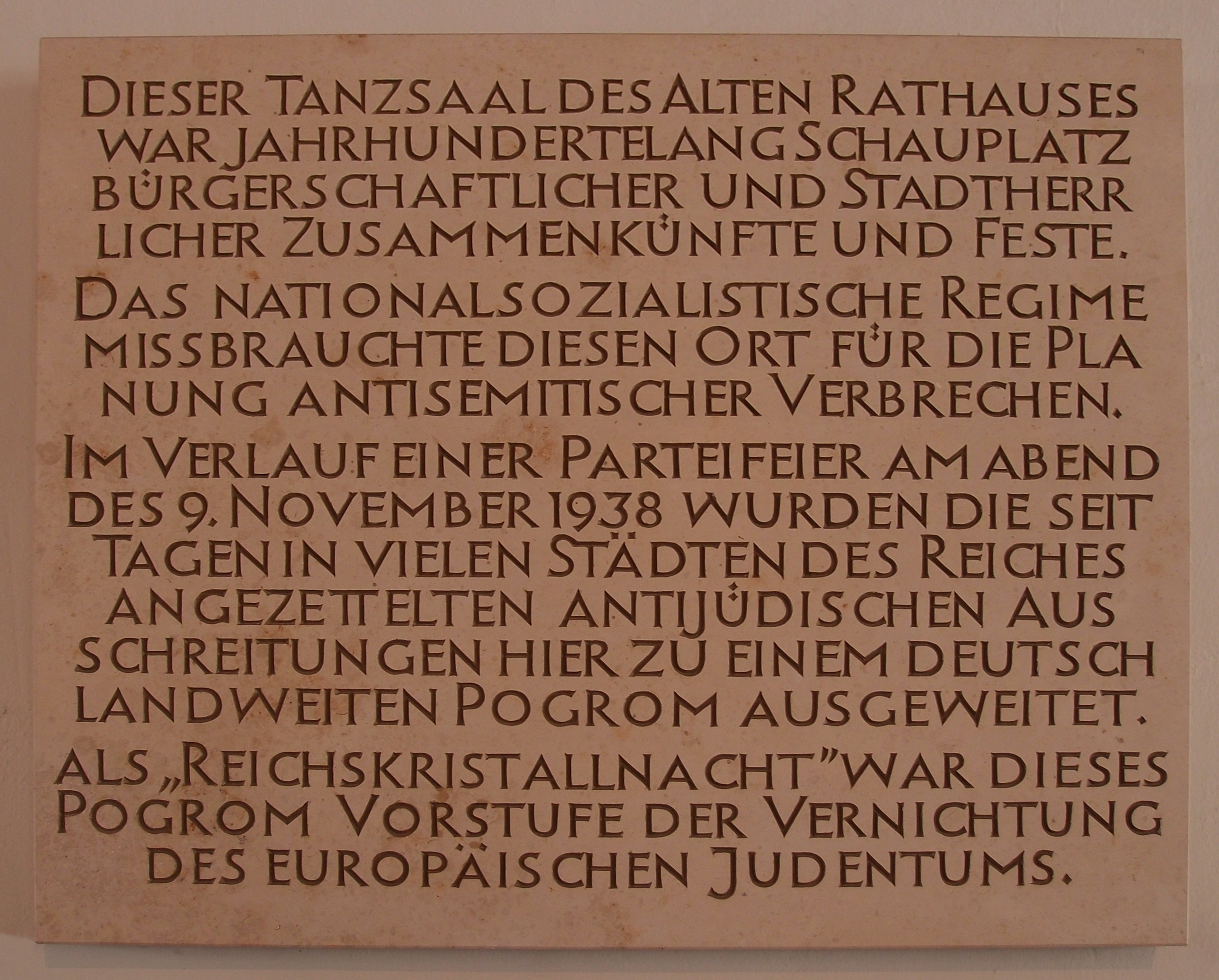 Gedenktafel am Alten Rathaus in München zu den Novemberpogromen 1938.